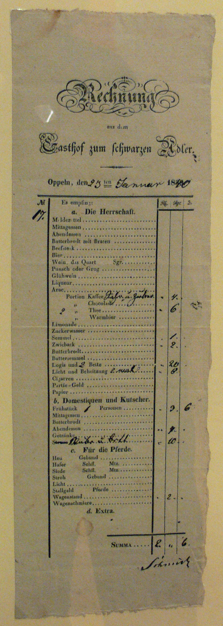 Rechnung des Gasthofs zum Schwarzen Adler, Oppeln, 1840 Fotografiert in der Ausstellung "Am Anfang war das Formular", Museum für Kommunikation Frankfurt, 2008